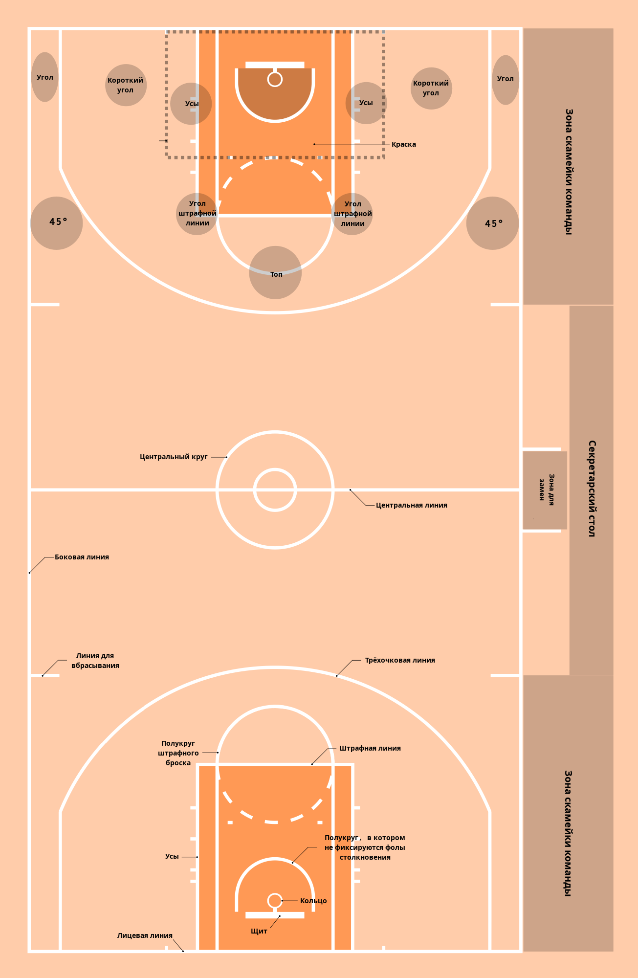 На этом изображении представлены важные зоны баскетбольной площадки: Краска, Угол, Короткий угол, Топ, Щит, Кольцо, Лицевая линия, Боковая линия, 45°, Усы, Штрафная линия, Полукруг штрафного броска, Полукруг, в котором не фиксируются фолы столкновения, Трёхочковая линия, Центральный круг, Центральная линия, Зона для замен, Секретарский стол, Зона скамейки команды, Линия для вбрасывания.